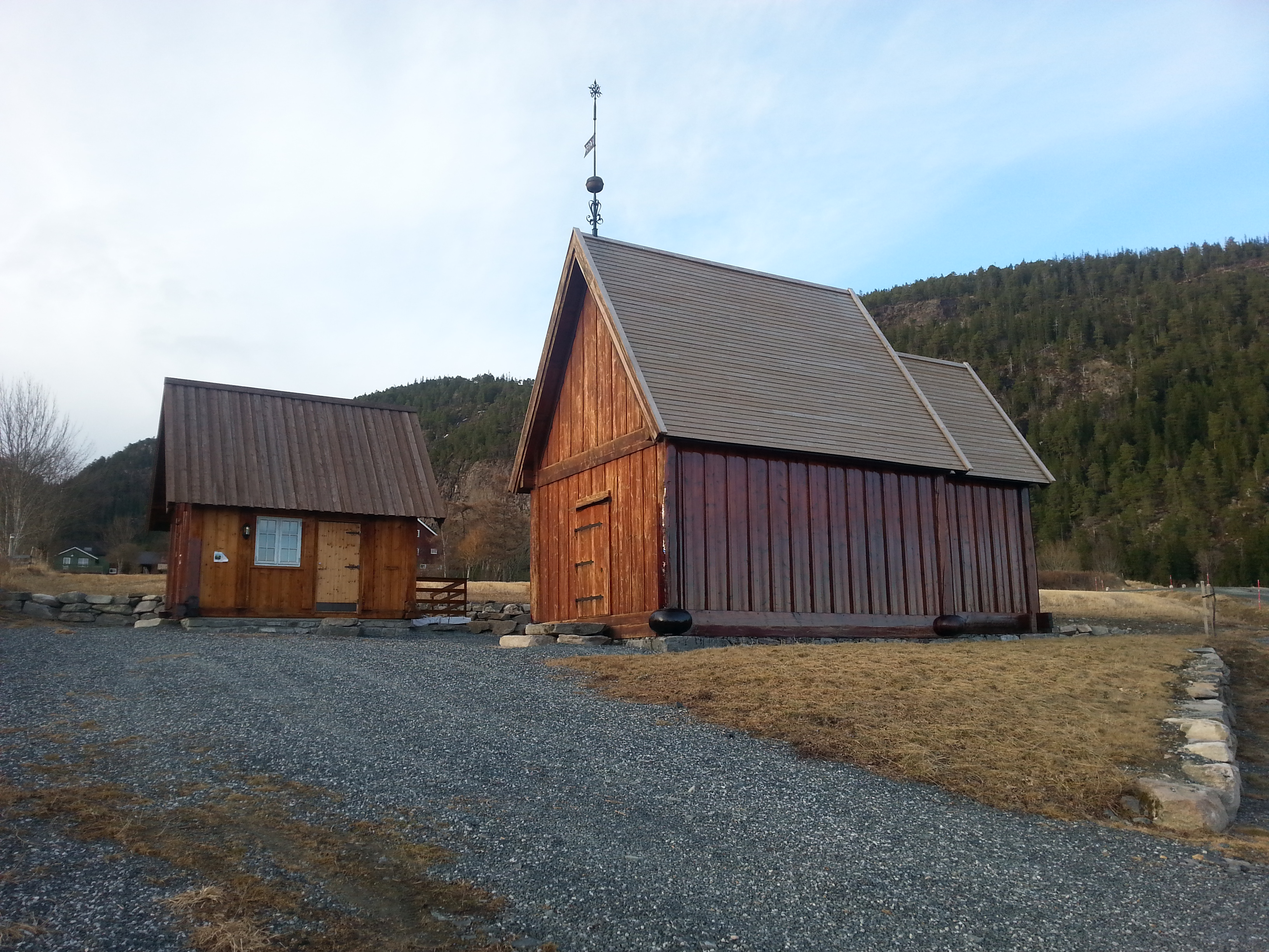 En kopi av den opprinnelige stavkirken